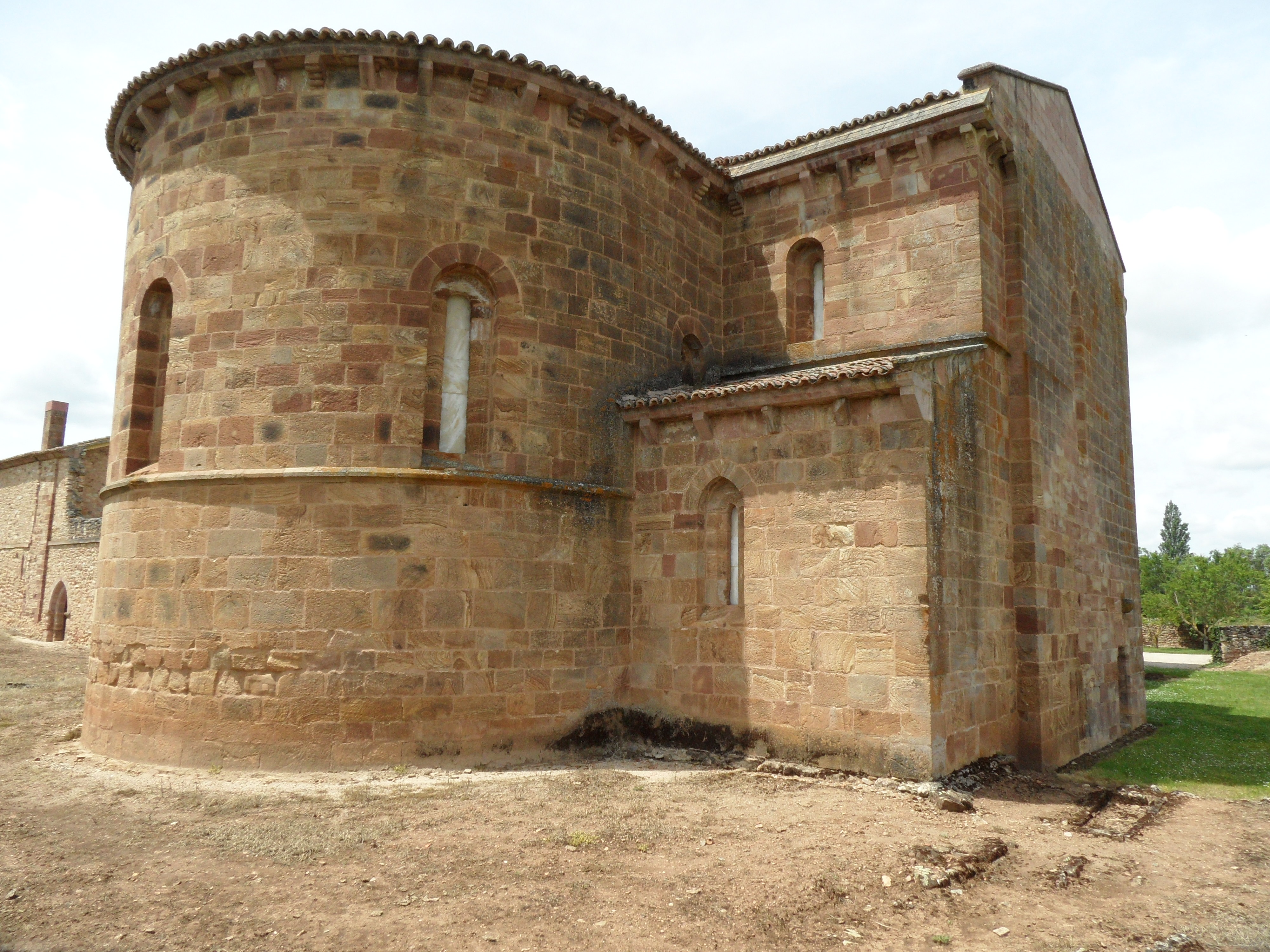 Monasterio Santa Maria de Bujedo de Juarros. Este Monasterio es de propiedad privada, y ha sido restaurado siendo galardonado por la Asociación Europa Nostra en el año 1981